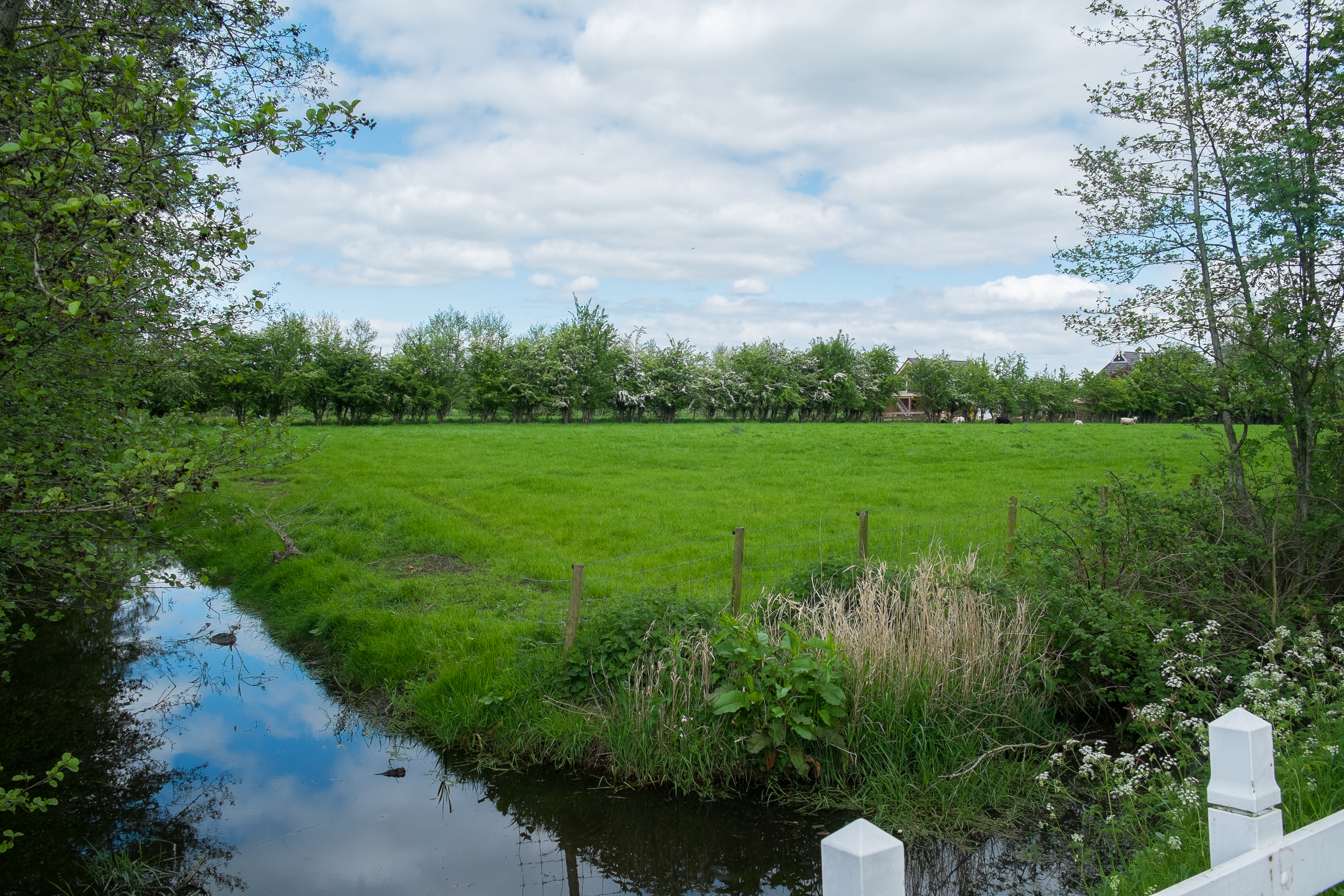 De Zwaddesloot vanaf de brug in het Swaddepaed in noordelijke richting